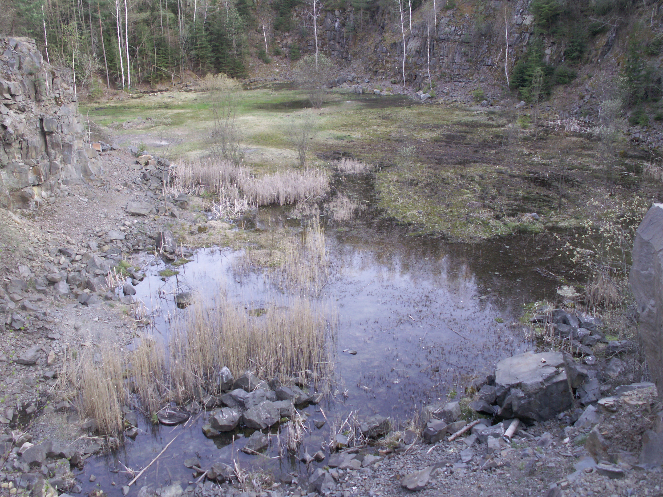 Přírodní památka Křtinský lom, severně od obce Křtiny, okres Blansko, lom založen v kulmských drobách, spodní etáž